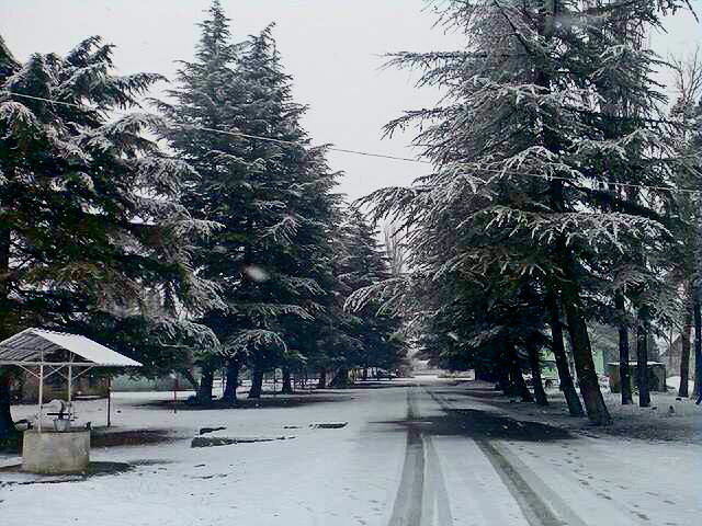 ს. თამარისი ზამთარში